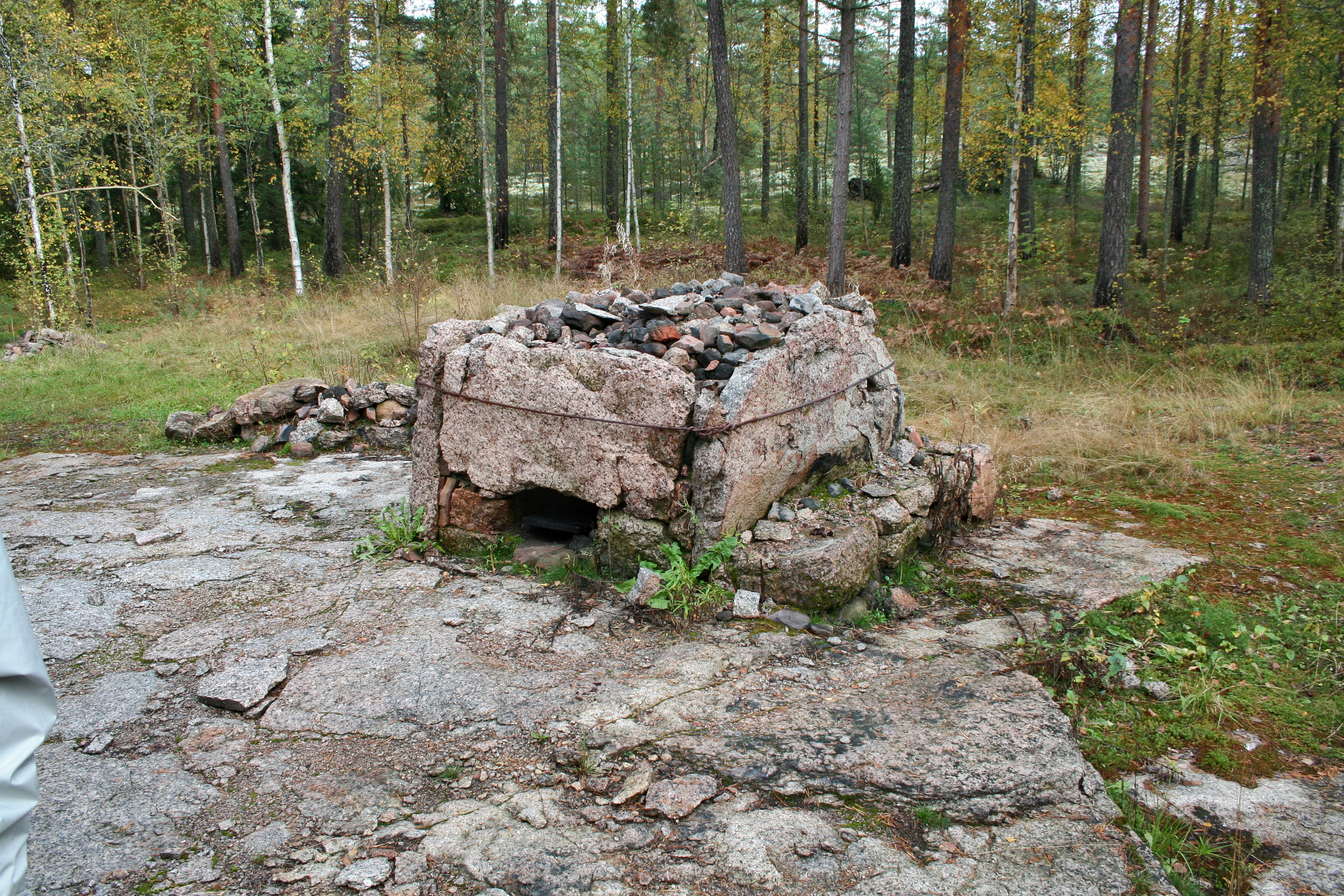 Riihen kiuas paikalla, josta riihi on palanut. Kivikylä, Lappi, Rauna